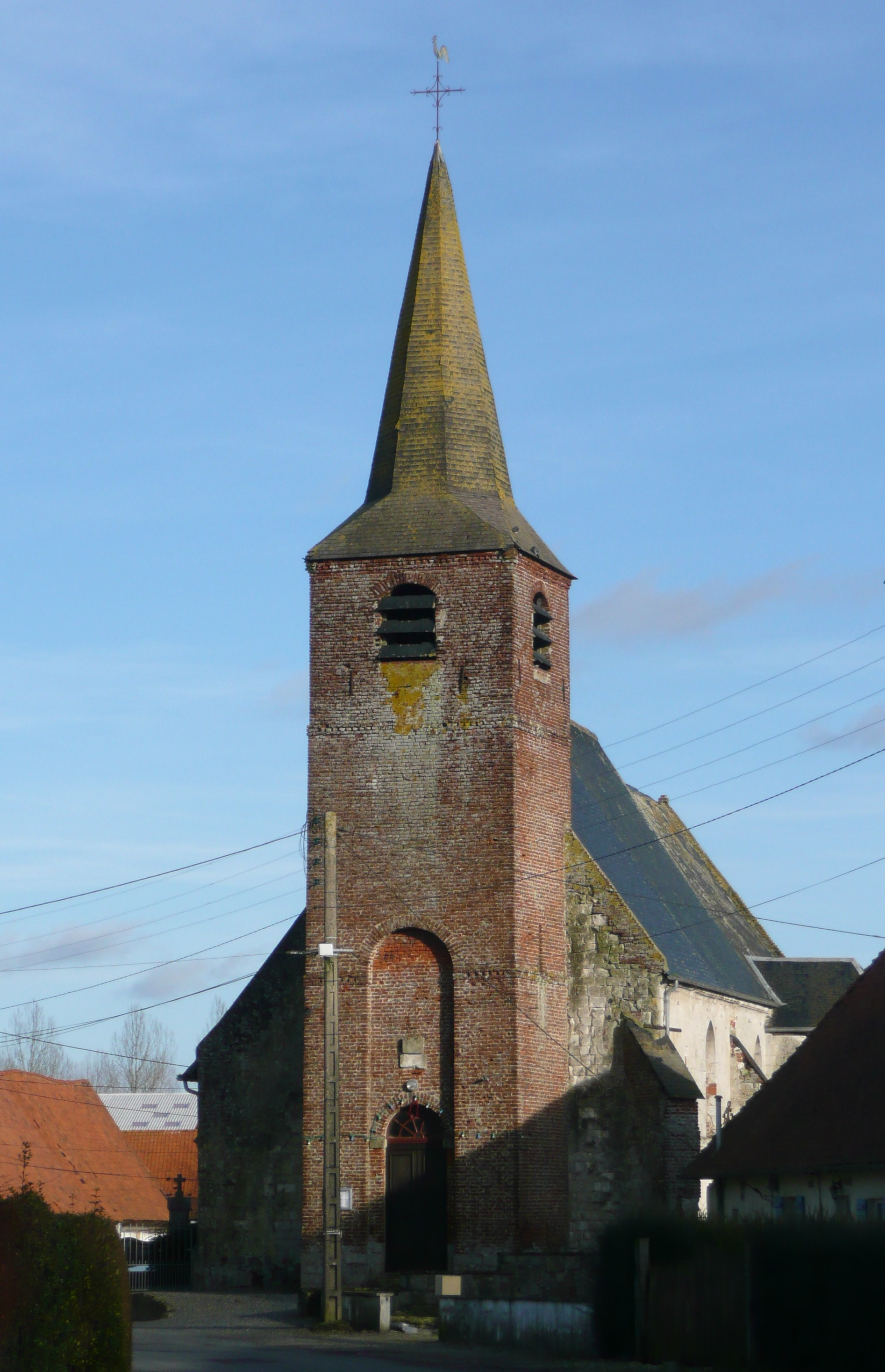 Eglise d'Humeroeuille